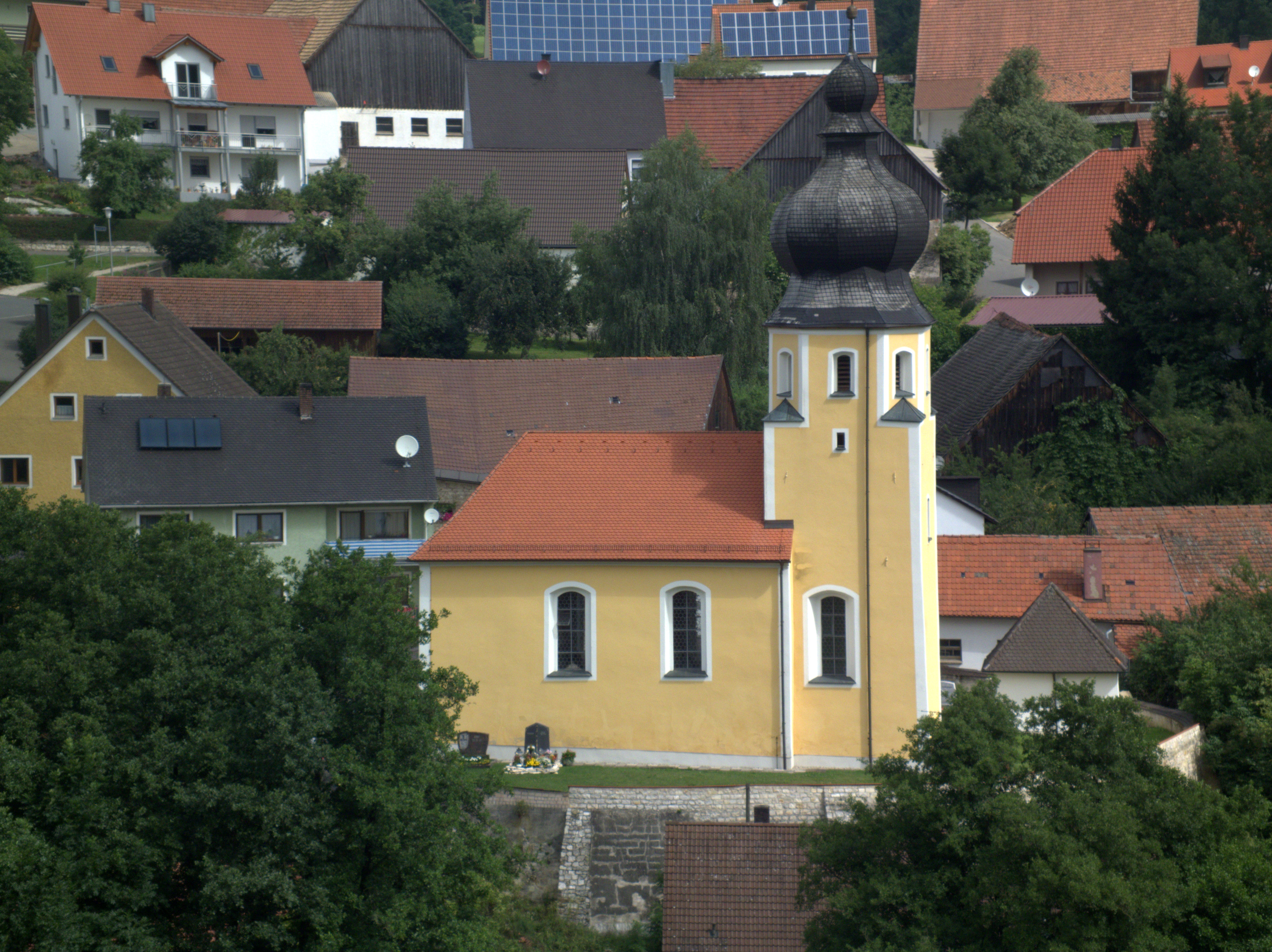 Katholische Filialkirche in Tauernfeld Oberpfalz: Kirche von Süden